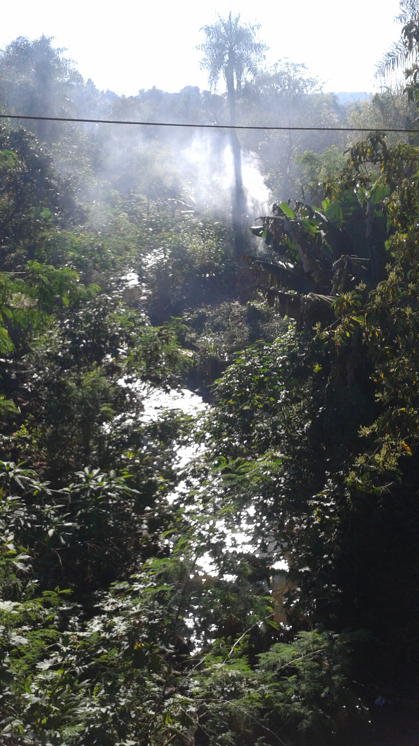 Arroyo Tulipán sobre puente en Avenida Nahuel Huapi en Jardin America, Provincia de Misiones, Argentina. Fuenteː Periodista Horacio Cambeiro.